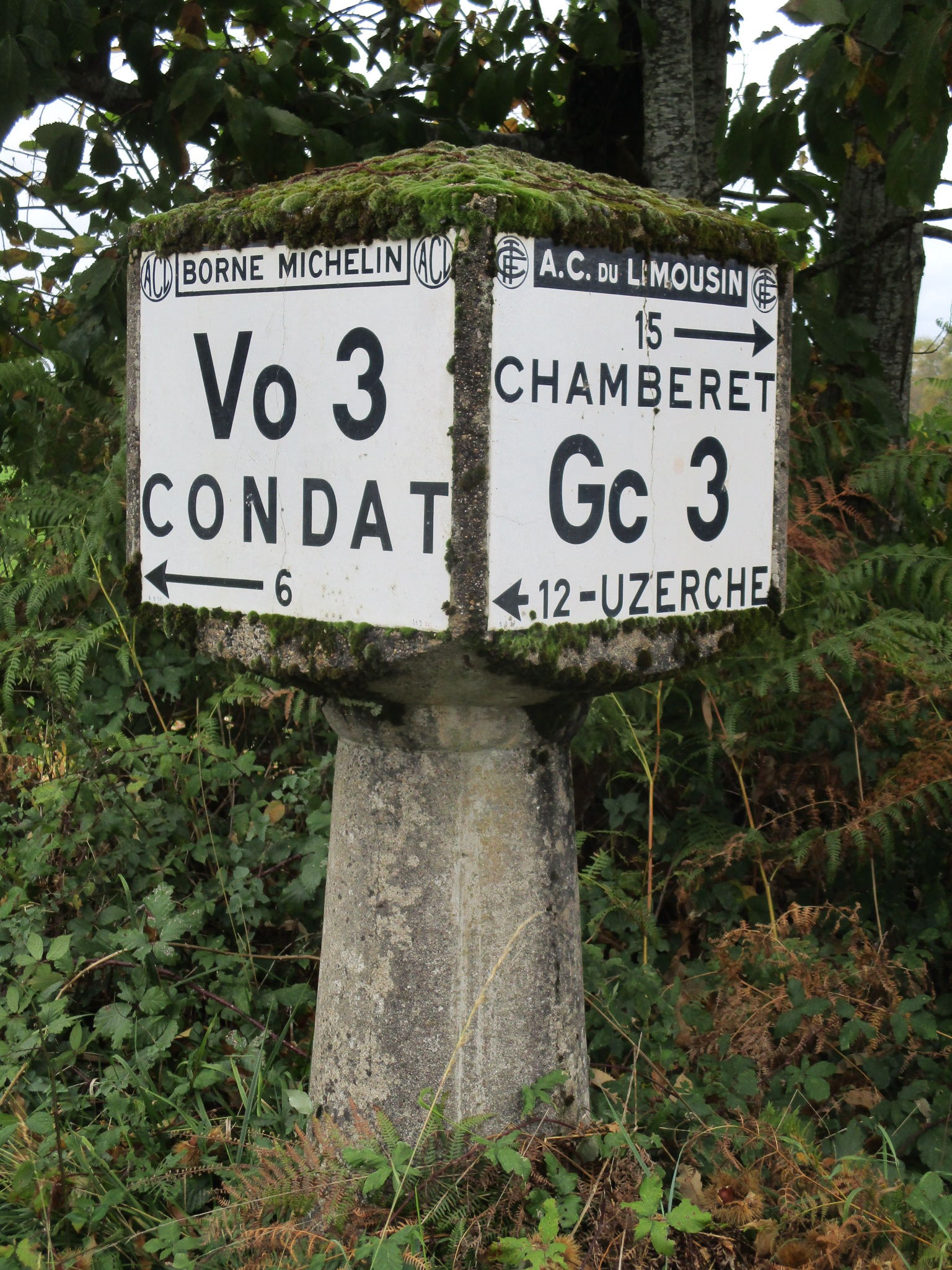 Ancienne borne Michelin à Eyburie (Corrèze, France).